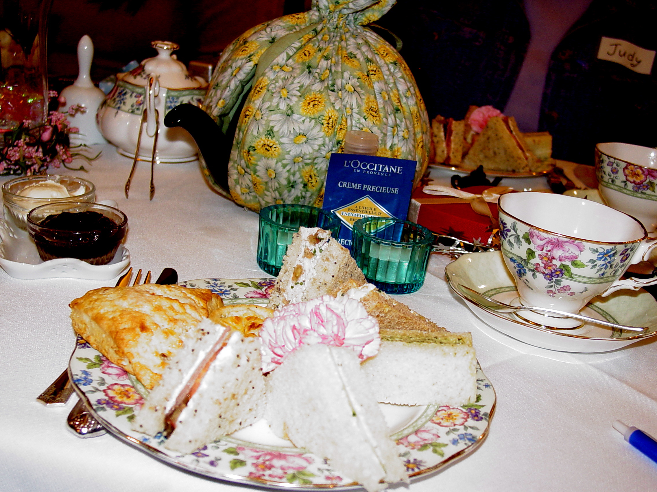 tea time